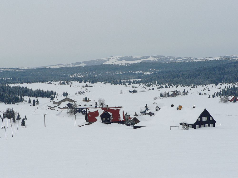 Jizerka village, Jizerske Mountains, Czech republic